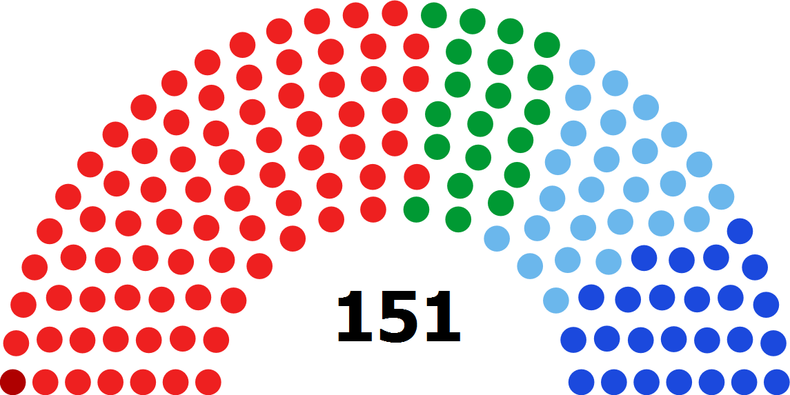 Sveriges riksdags första kammare efter valet 1968, vid riksdagen 1969.